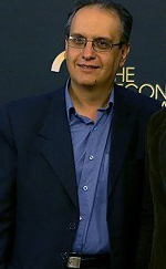 مزدا انصاری - دومین جشن سالانه موسیقی ما تالار وحدت یکم مهر ۱۳۹۳